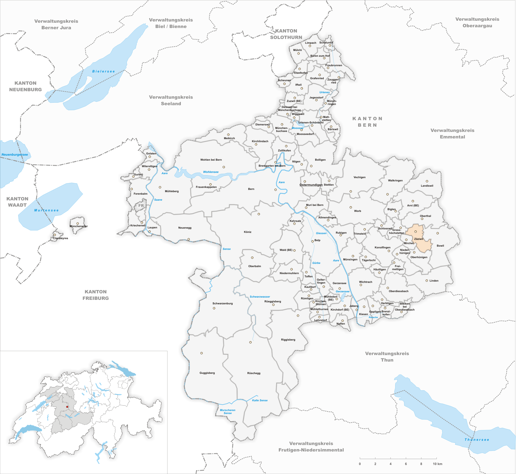 Municipality Zäziwil